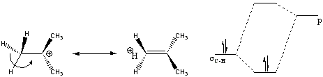 referencia hiperconjugação